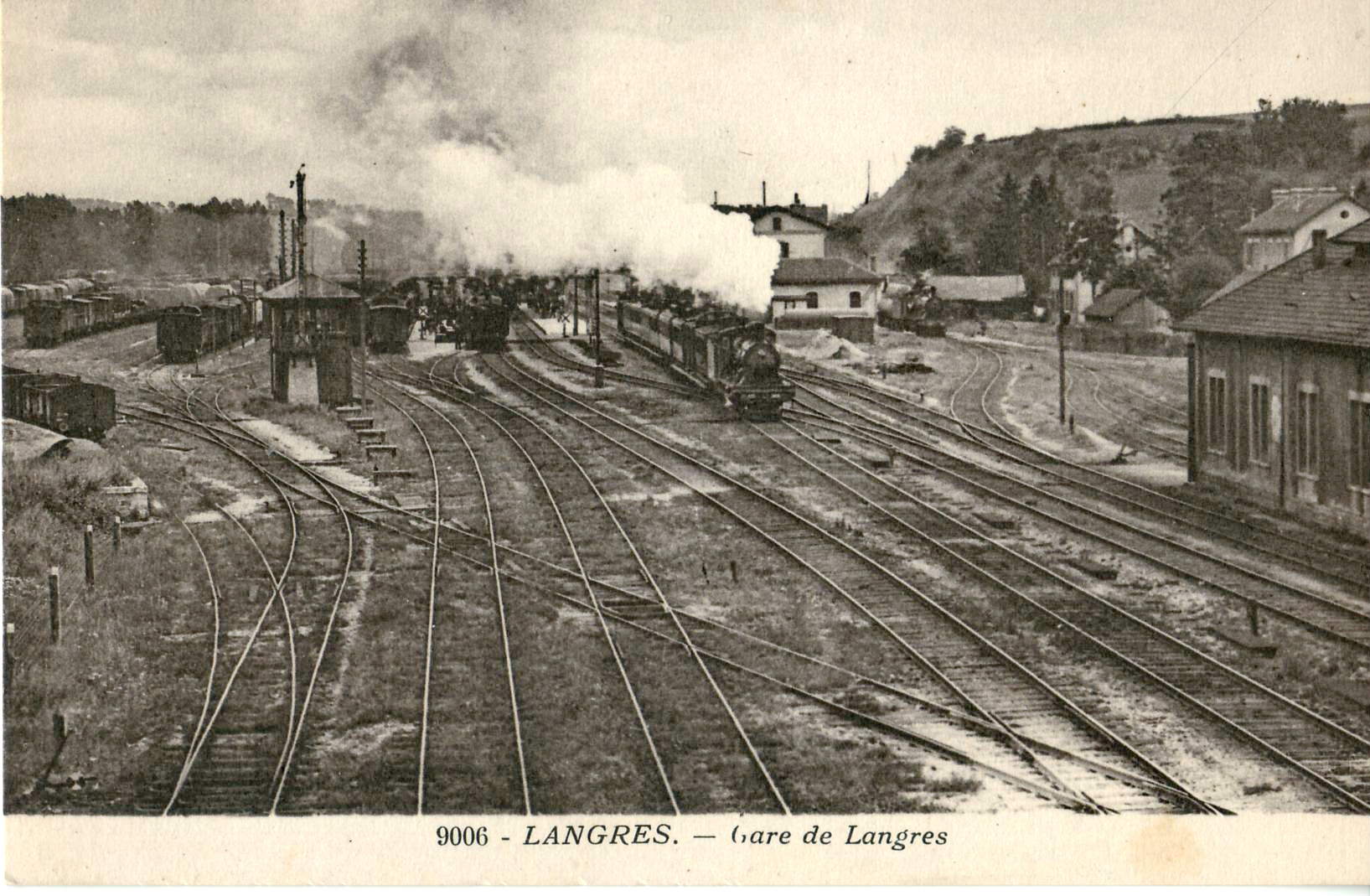 Carte postale ancienne éditée par ES, n°9006 : LANGRES - Gare de Langres